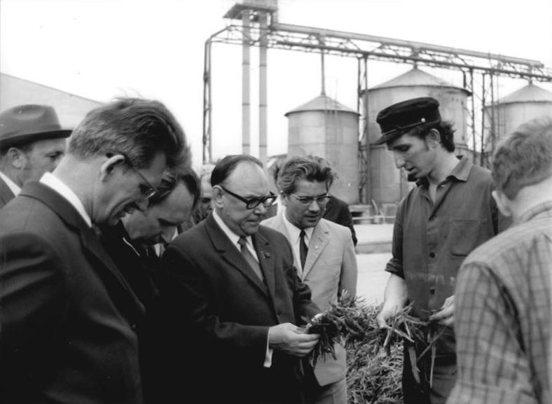 LPG Dedelow, Besuch durch sowjetischen Botschafter ADN-ZB Gahlbeck la-19.6.72 Bez.Neubrandenburg: Jefremow besucht Genossenschaftsbauern-Der Außerordentliche und Bevollmächtigte Botschafter der UdSSR in der DDR, Michail Jefremow (3.v.l.), besuchte am 19.6.72 die Kooperation Dedelow.Fütterungstechniker Walter Blumthal (r) erklärte dem Gast die Zusammensetzung des Silagefutters.2.v.l.: Manfred Jähne, Leiter der 2000 Milchviehanlage Dedelow, l.: Gottfried Sperling, Vorsitzender des Rates des Bezirkes, 2.v.r.: Johannes Chemnitzer, 1.Sekretär der Bezirksleitung der SED Neubrandenburg, (vergl. L 0619-28N) Mitglied des ZK der SED.